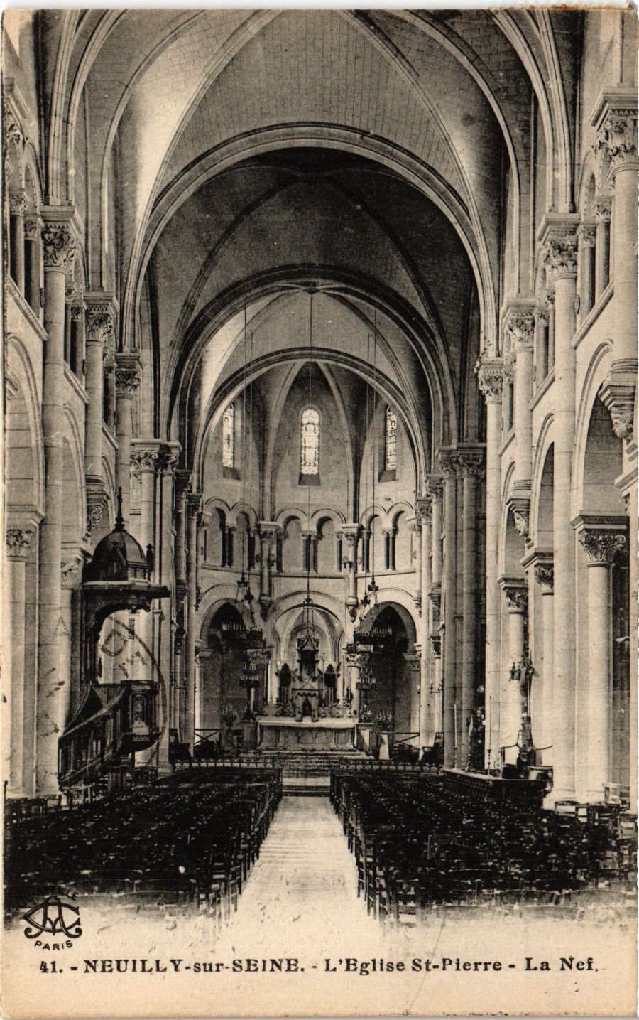 Intérieur de l'église Saint-Pierre de Neuilly en 1920.